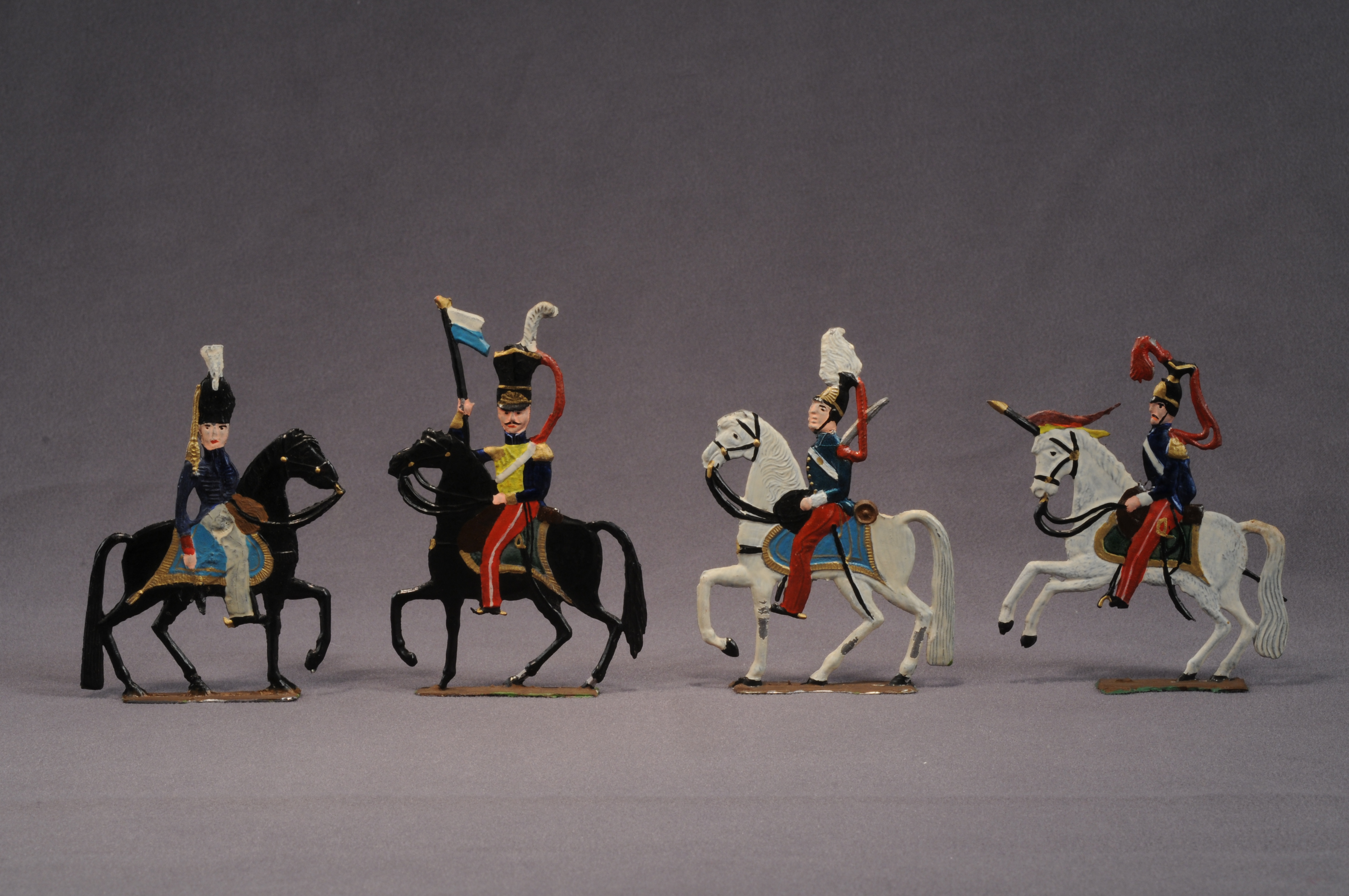 Soldadets Gabinet col·leccionista - Fot. R. Muro.JPG